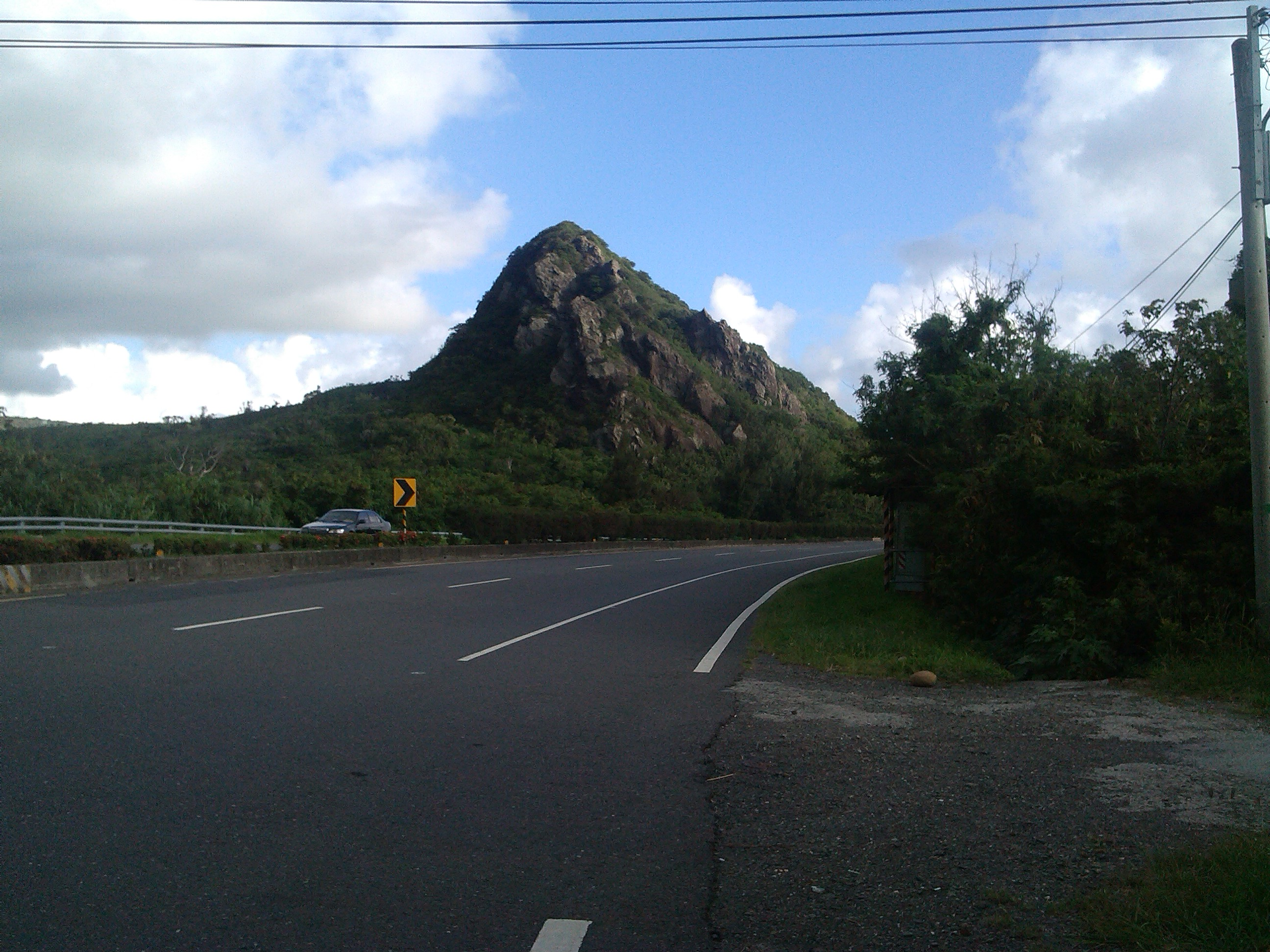 台26線省道上的小尖山